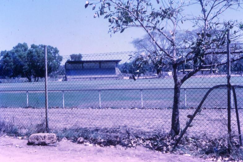 Gardens Oval in 1972.